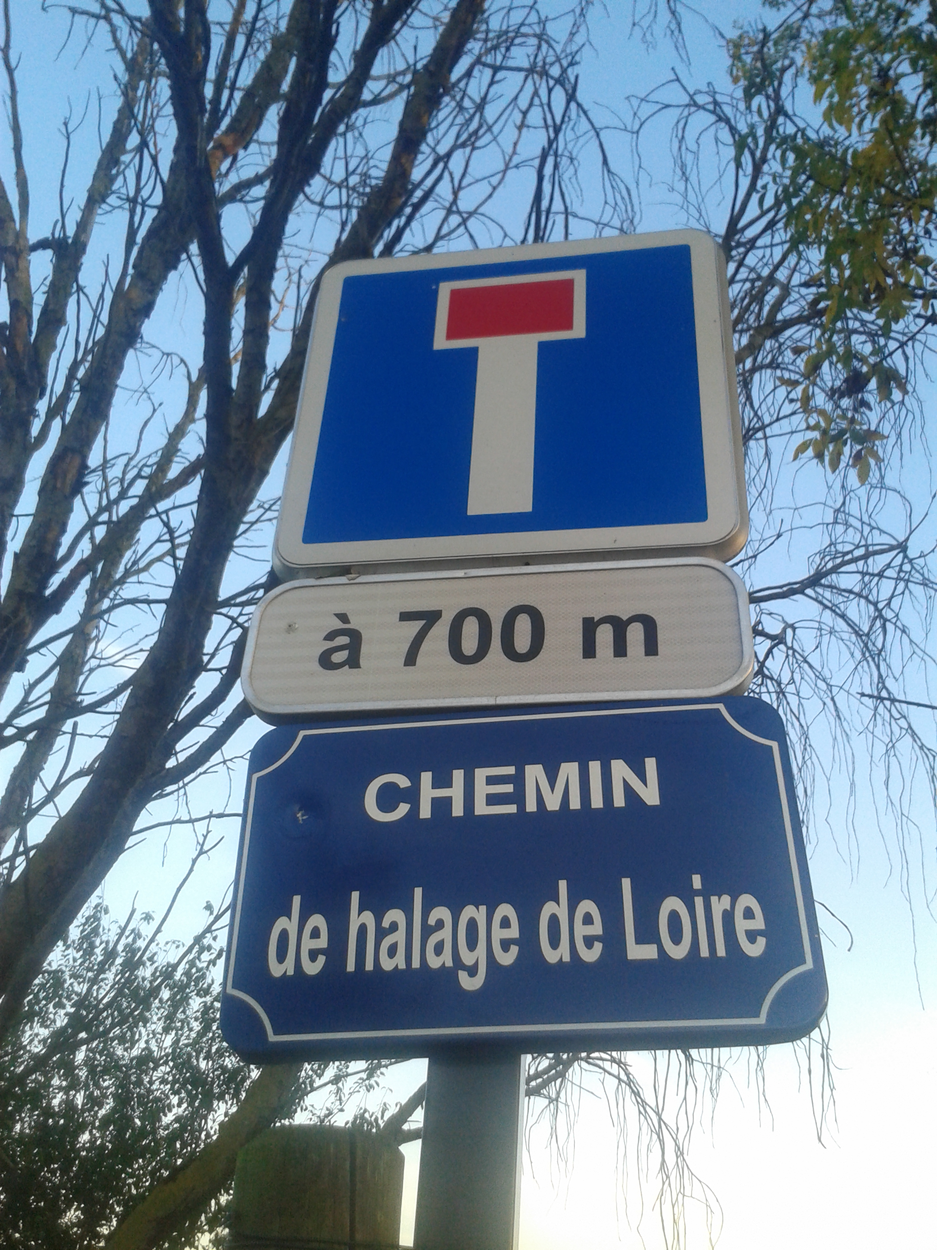 Panneau indiquant le début du chemin de halage de la Loire, dans le village de Bellevue (Sainte-Luce-sur-Loire)